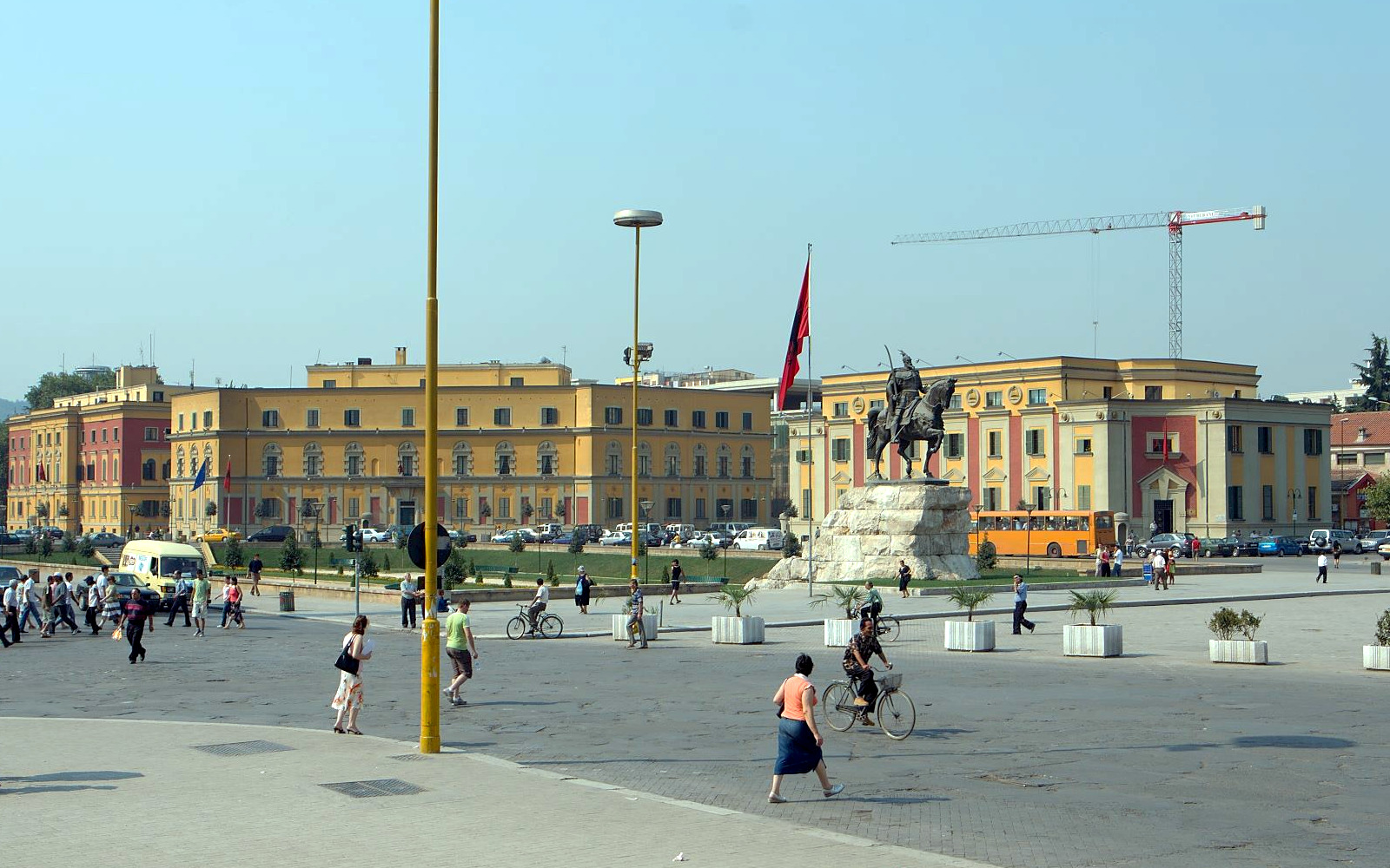 Taken in Tirana, Albania